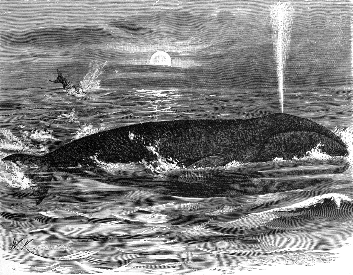 Balaena mysticetus